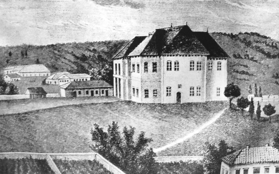 Sitz des Fürsorgekomitees in Kischinov um 1820